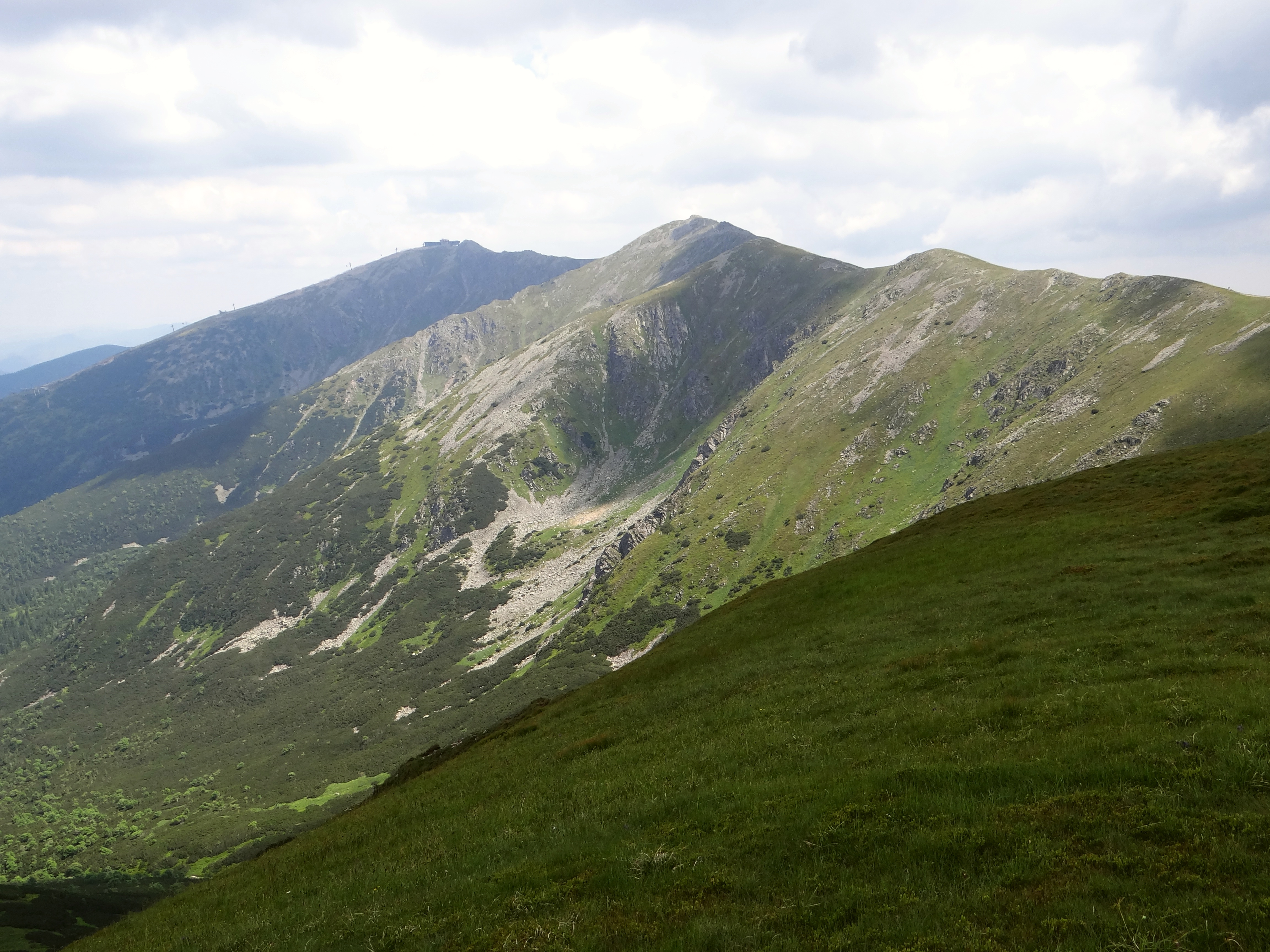 Dereše